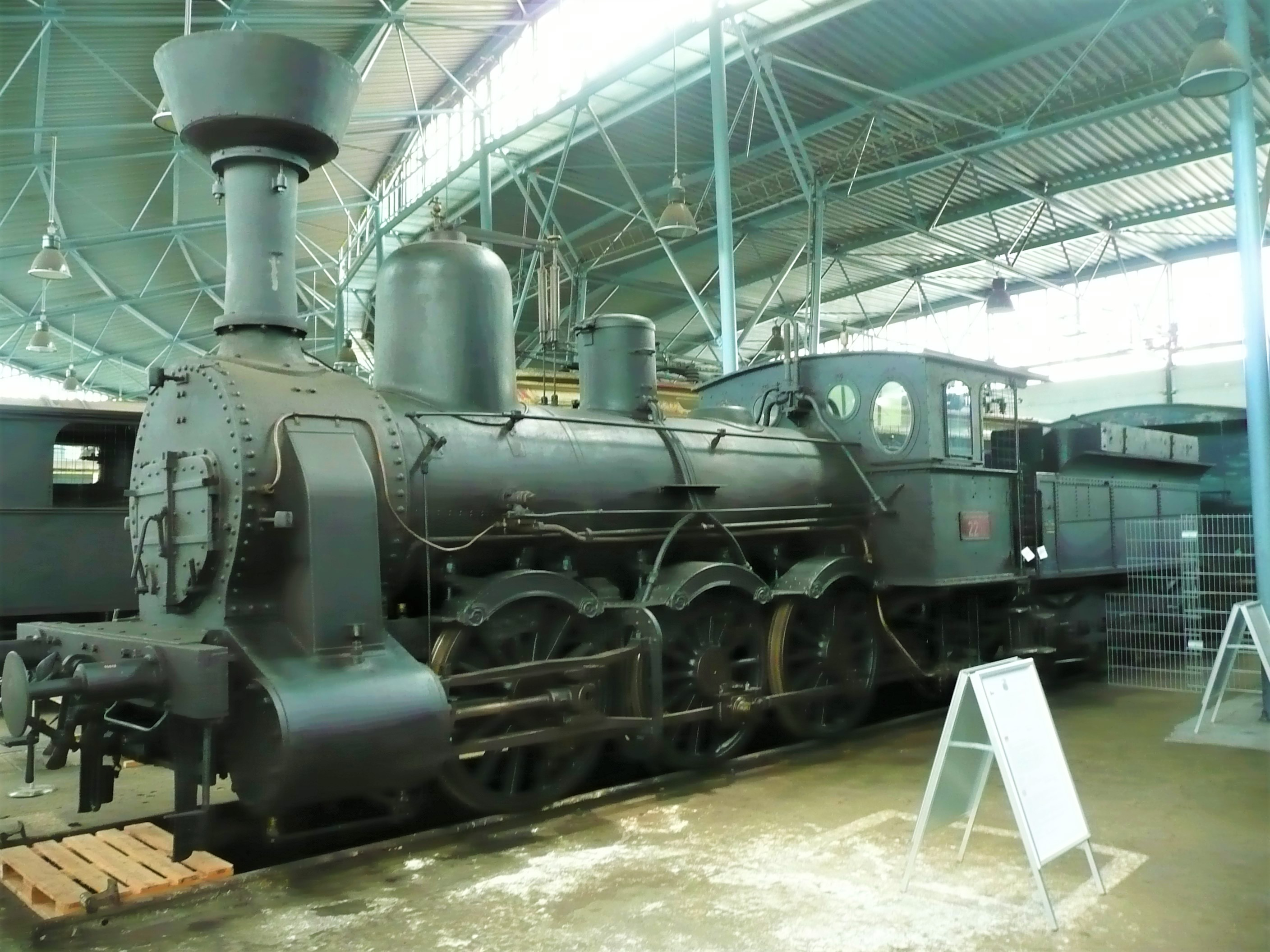 322.302 ausgestellt im NTM Depot Chomutov